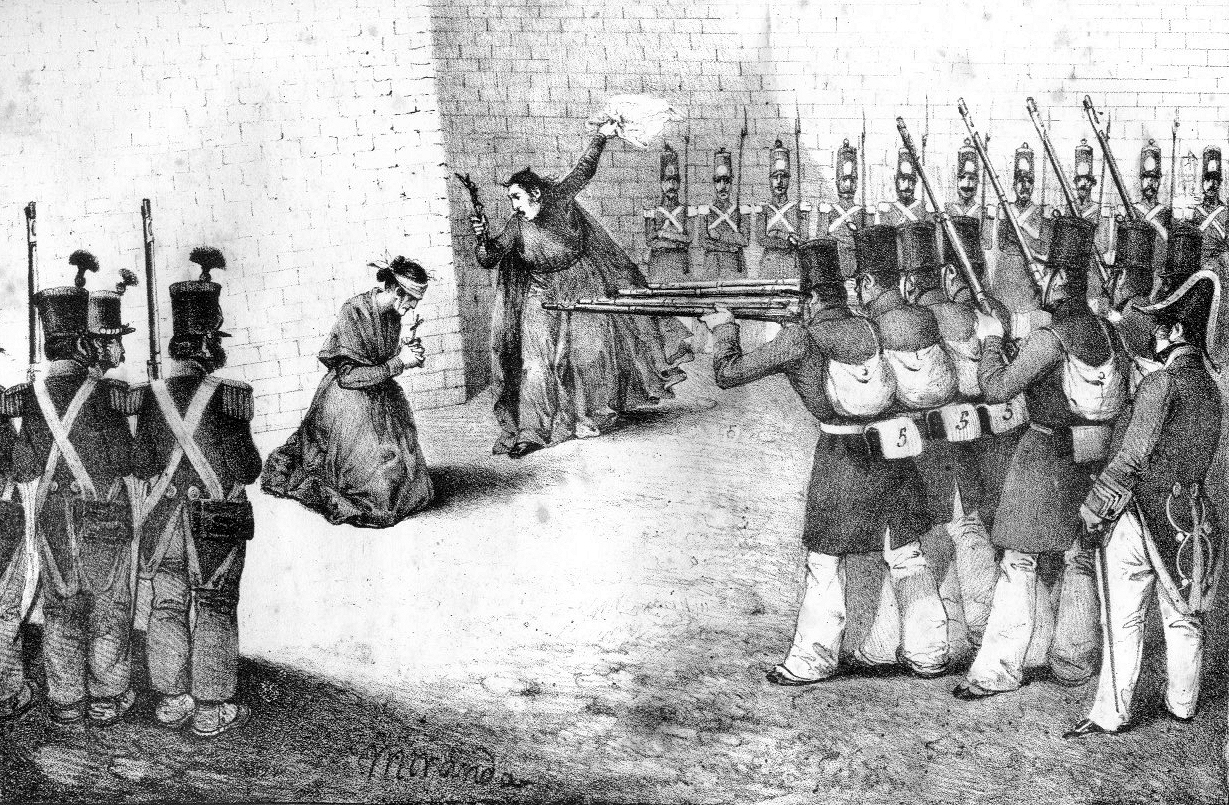 Fusilamiento de la madre de Ramón Cabrera. Dámaso Calbo y Rochina de Castro. "Historia de Cabrera". Madrid 1845